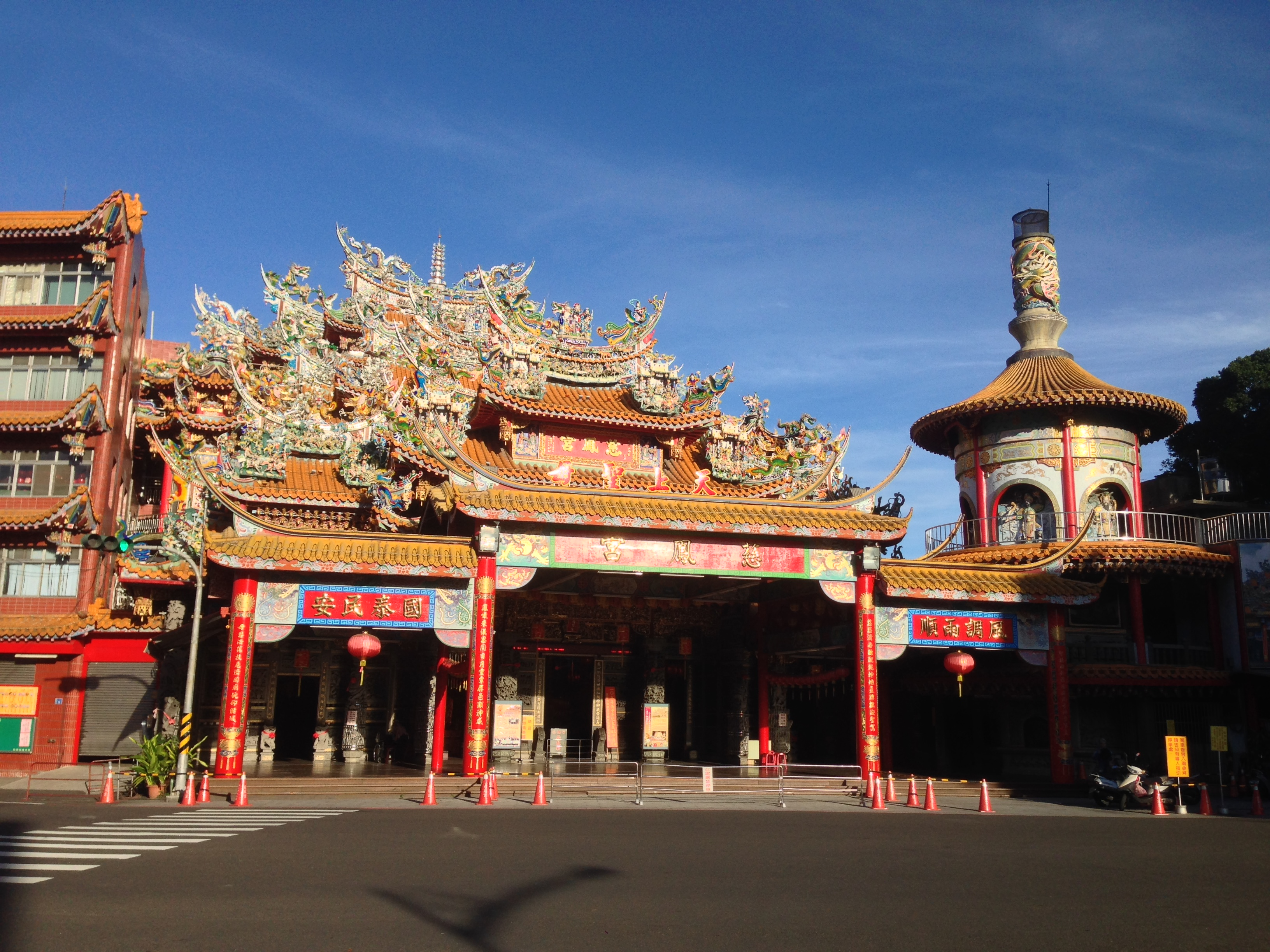 中文（台灣）: 屏東慈鳳宮媽祖廟